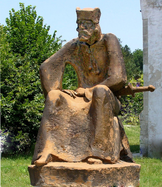 Panovník Veľkej Moravavy od roku 846, Rastislav (820? - 870), Slovienska – Brigádnická ul. Bratislava